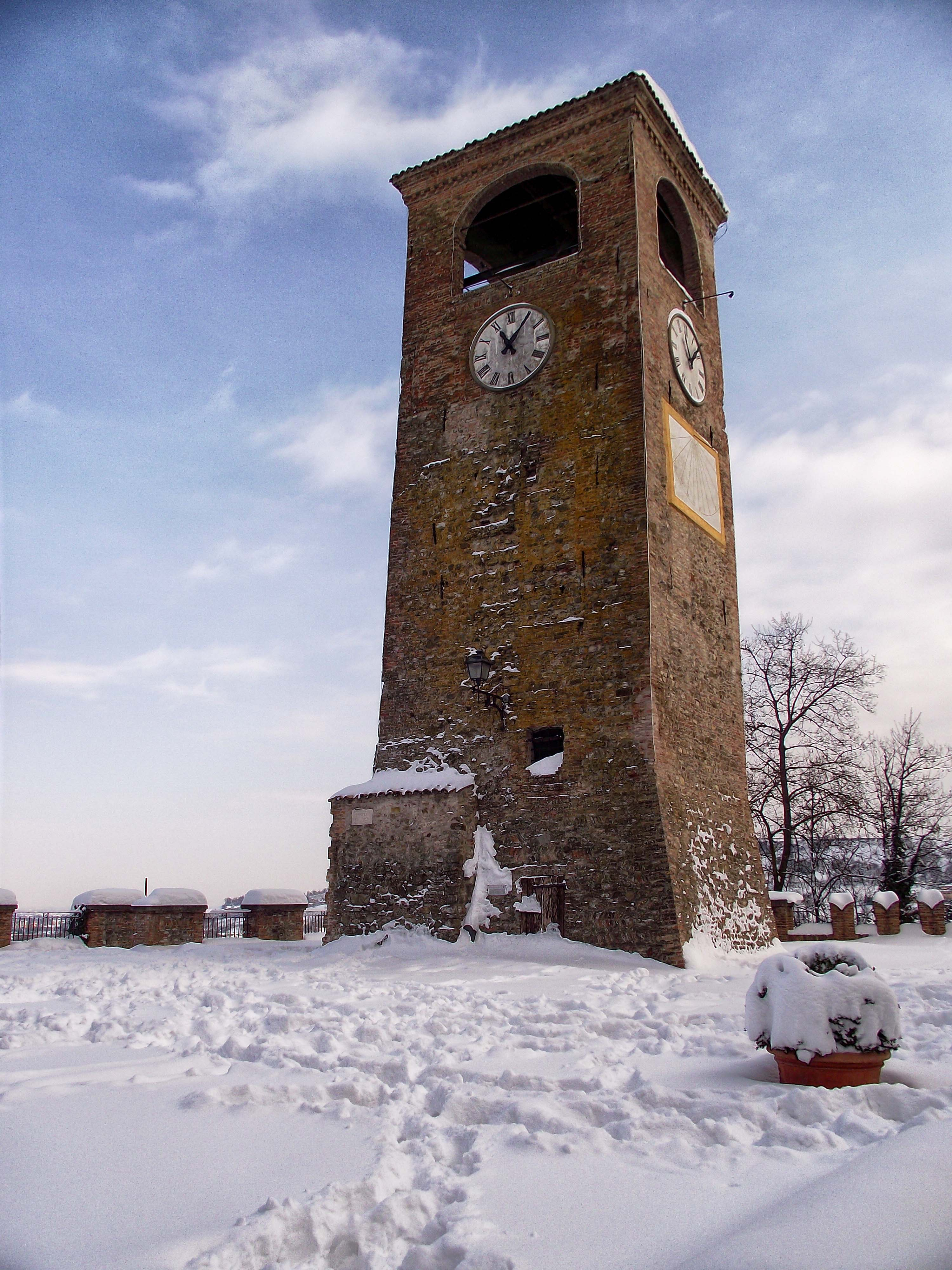 Torre dell'Orologio - MIBAC This is a photo of a monument which is part of cultural heritage of Italy.